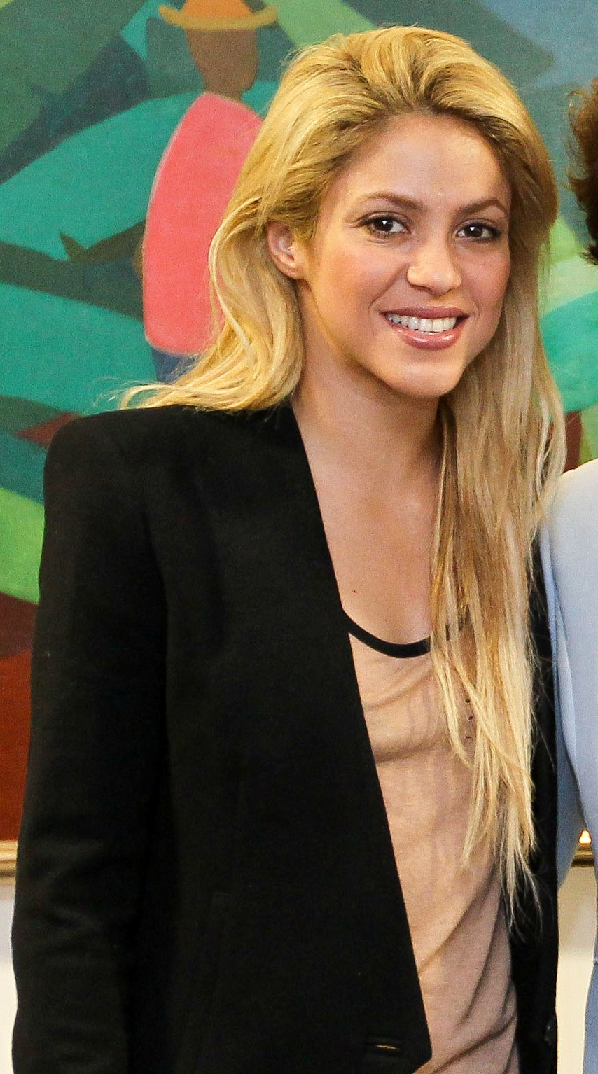 Presidenta Dilma Rousseff junto com a cantora Colombiana Shakira em 2011.